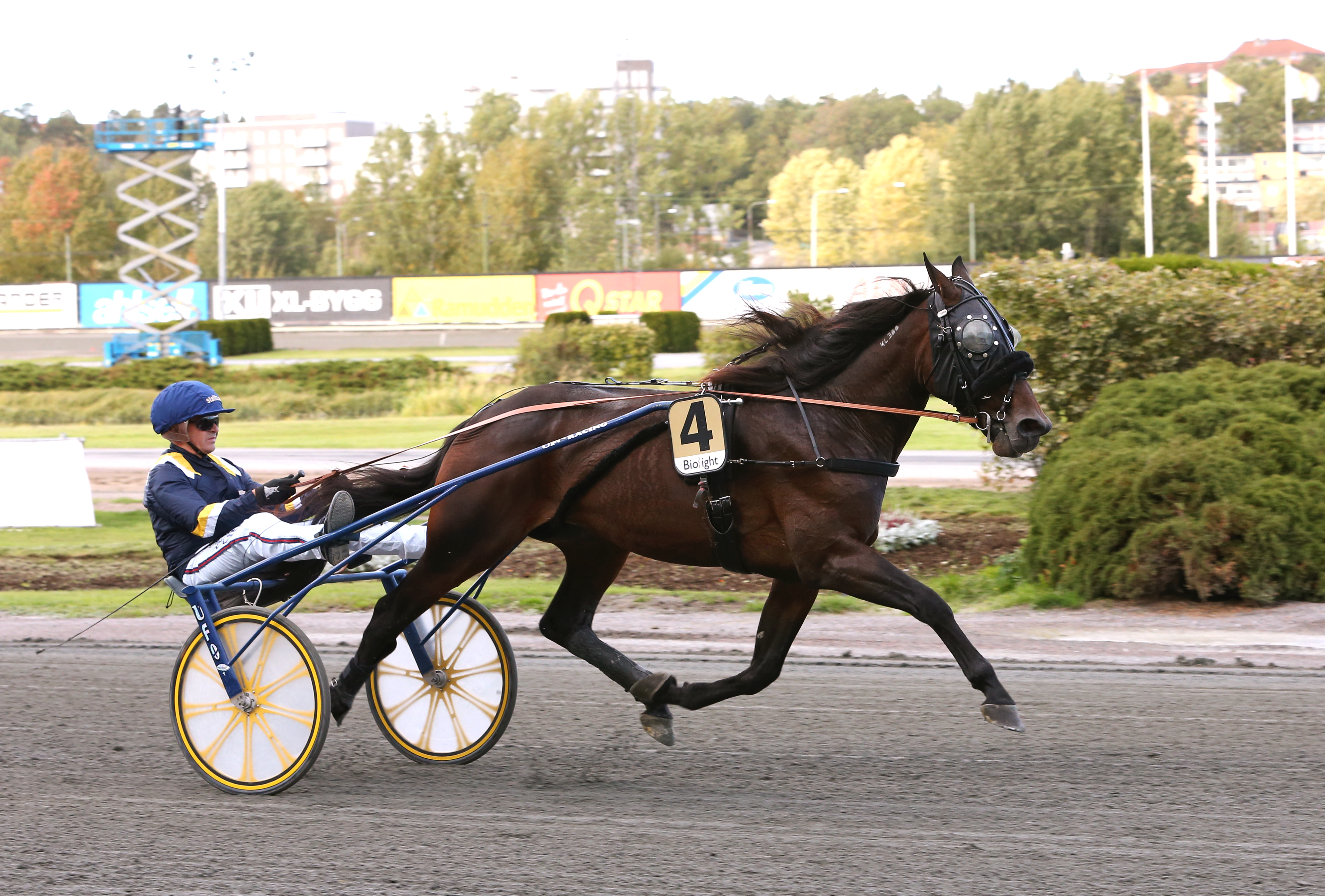 Foto: Maria Holmén/TR Bild.Solvalla 20180930. Milligan's School med kusken Ulf Eriksson.